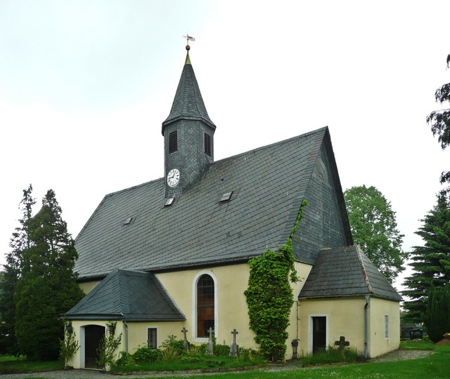 Fischbach: Blick auf die Dorfkirche, 14 km from Pirna, Deutschland (Zone 33).